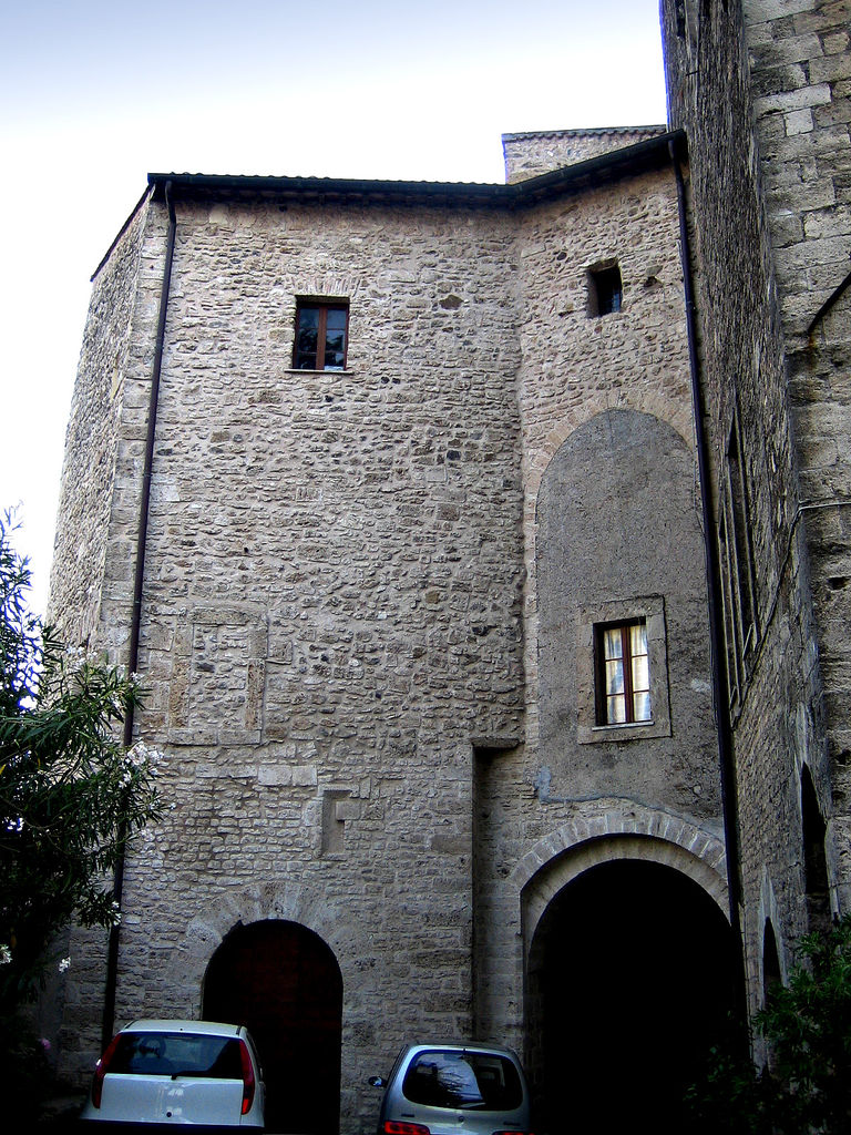 Anagni, Lazio, Italia